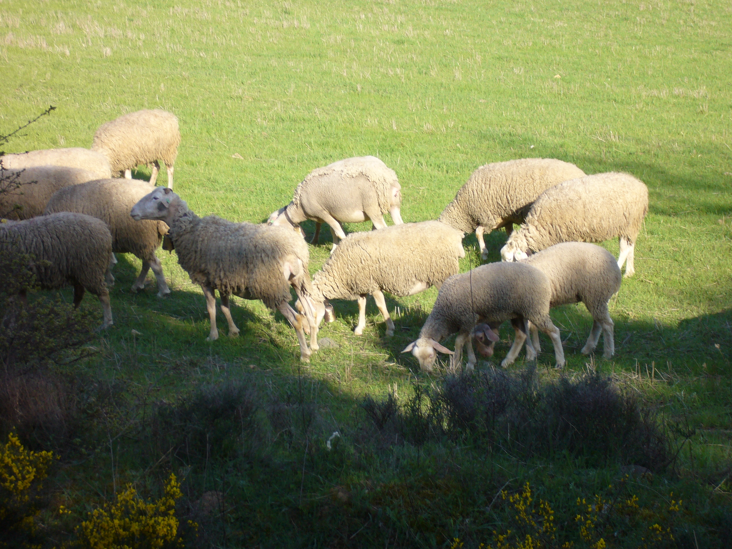 Ardi txurrak Añanan